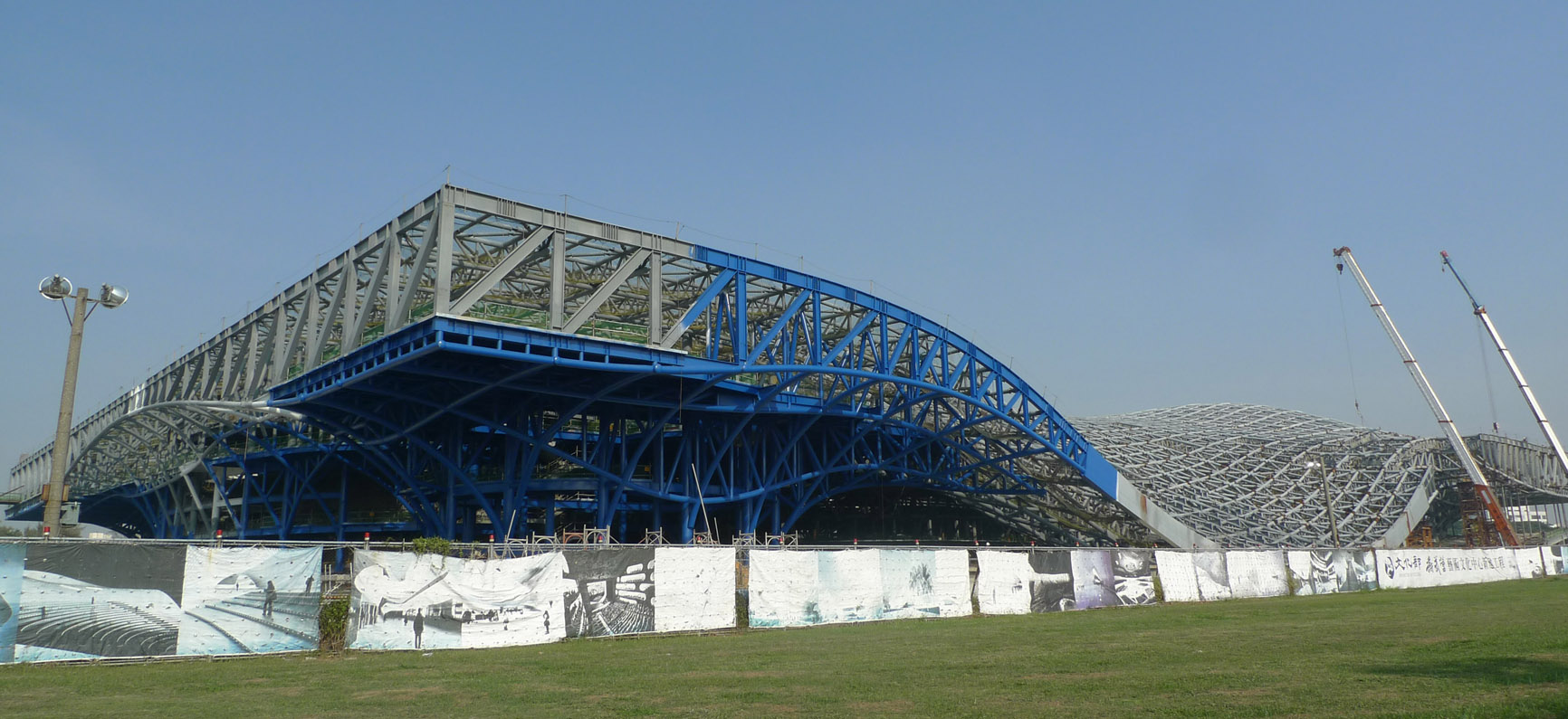 Das im Bau befindliche Wei-Wu-Ying-Zentrum in Kaohsiung